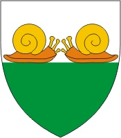 Wappen von Marnand Kanton Waadt Schweiz